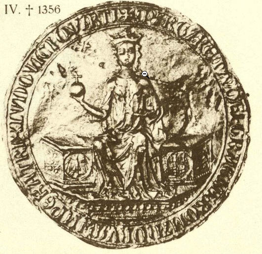 This is a scan of the historical document: Title: Die Siegel der deutschen Kaiser und Könige v. 1 (751 - 1347)